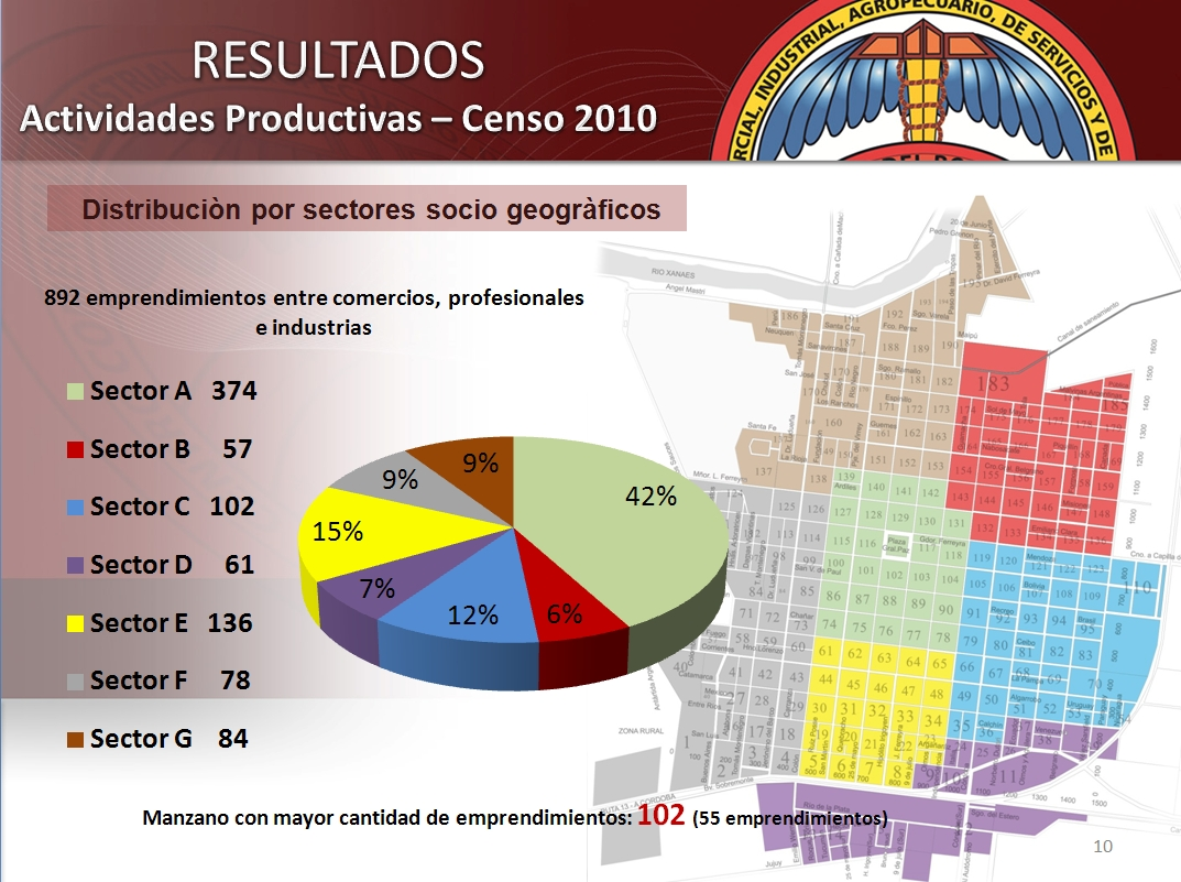 Distribuciòn geogràfica de las actividades productivas de Villa del Rosario, Censo Comercial 2010